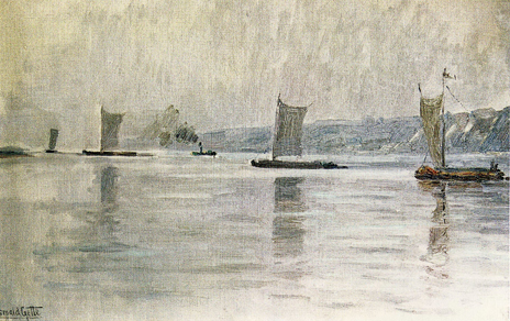 Weichselkähne bei Graudenz, geschaffen von Oswald Gette, ohne Jahresangabe, Öl auf Karton